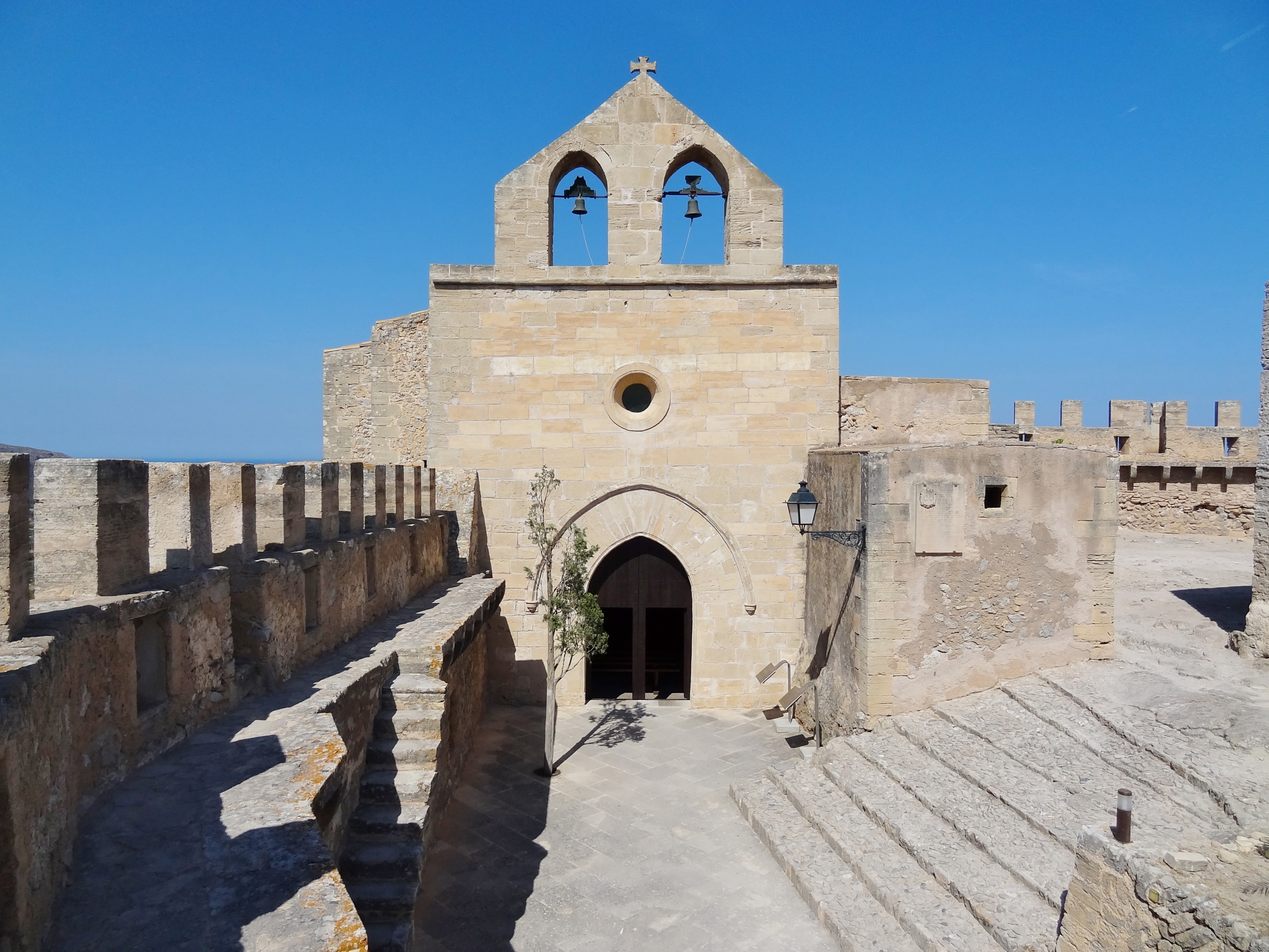 Nuestra Senyora de la Esperanza, Kirche im Castell de Capdepera, Gemeinde Capdepera, Mallorca, Spanien